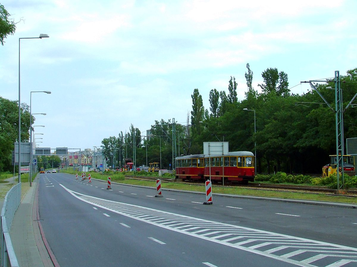 Ulica Stefana Starzyńskiego w Warszawie